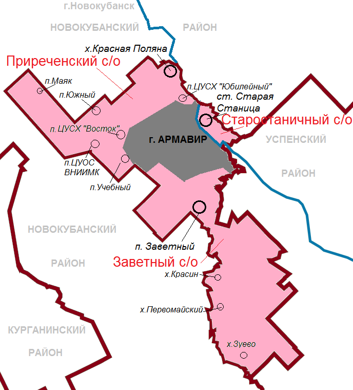 Сельские округа, подчинённые г. Армавиру Краснодарского края